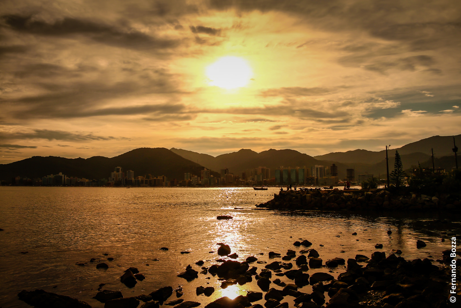 Itapema Beach on state of Santa Cataria Brazil